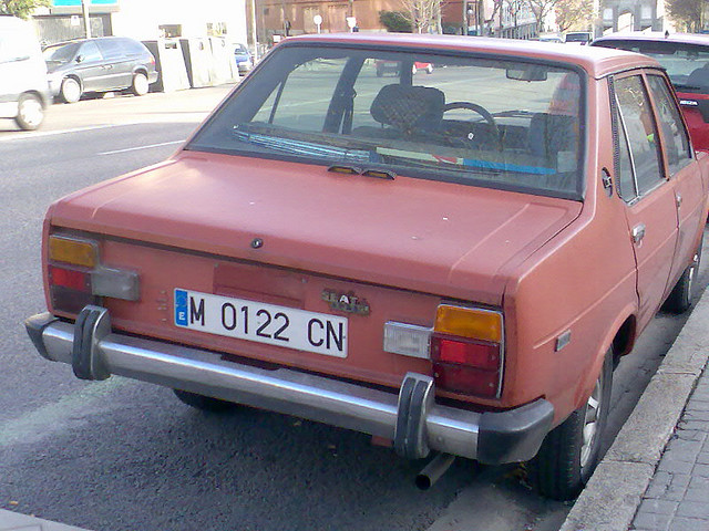 SEAT 131 Español FB192M22PLACA MATRICULA CHAPA M MADRID ESPAÑA SEAT Camera: Nokia 6288 License on Flickr (2011-02-18): CC-BY-2.0 Flickr tags: SEAT, 131 SEAT, Mirafiori, Madrileño, 131